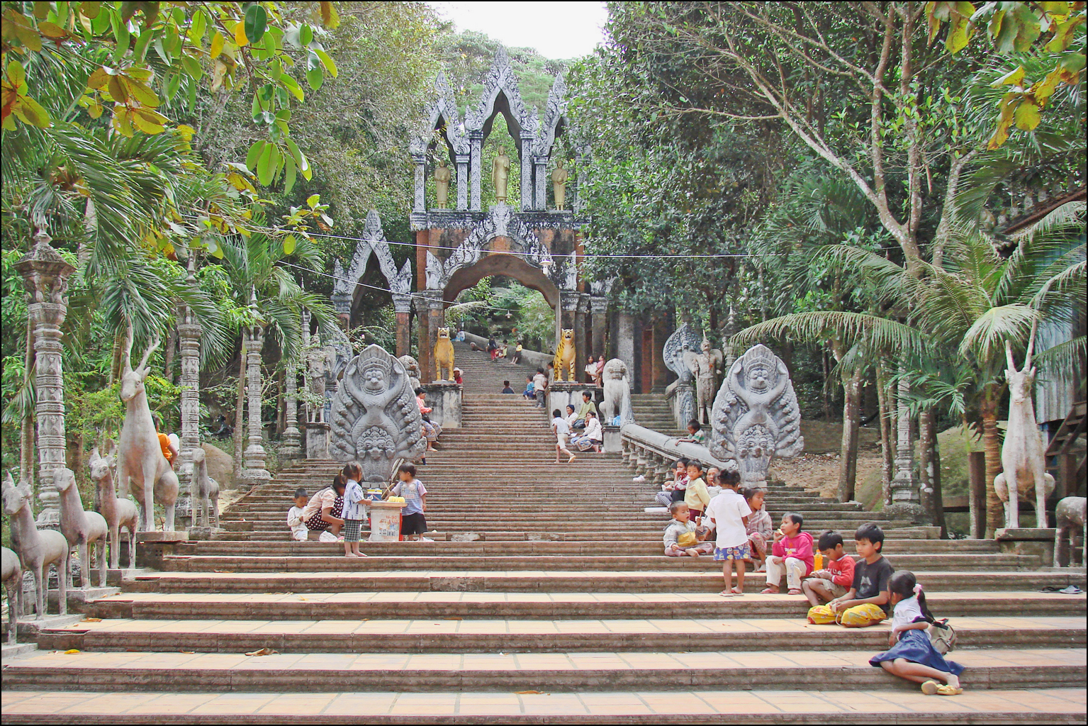 Le Phnom Kulen est la montagne sacrée des khmers. Elle est située à 50 Km de Siem Reap et domine la plaine où se trouvent les grands temples. Les rivières, qui coulent à Angkor, prennent leurs sources dans cette montagne. Article Wikipedia sur le Phnom Kulen